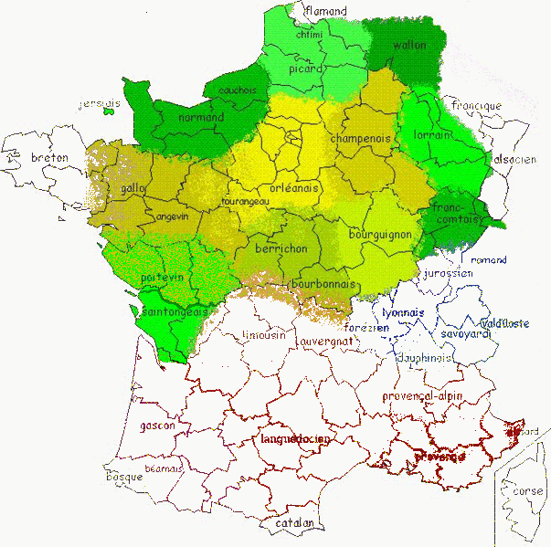 Langues d'oïl sauf le français